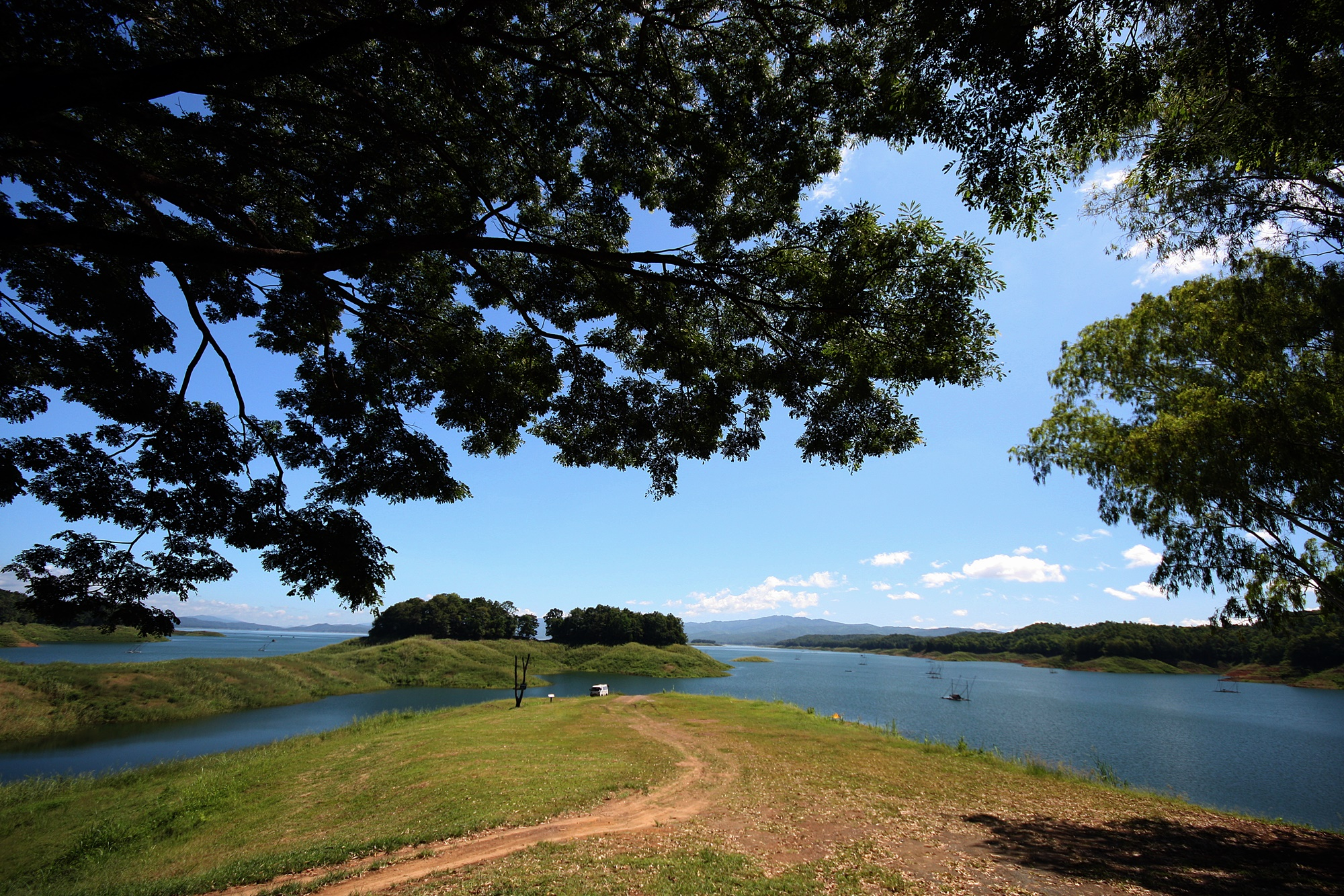 อุทยานแห่งชาติลำน้ำน่าน จังหวัดอุตรดิตถ์ อุทยานแห่งชาติลำดับที่ 87 ของประเทศไทย